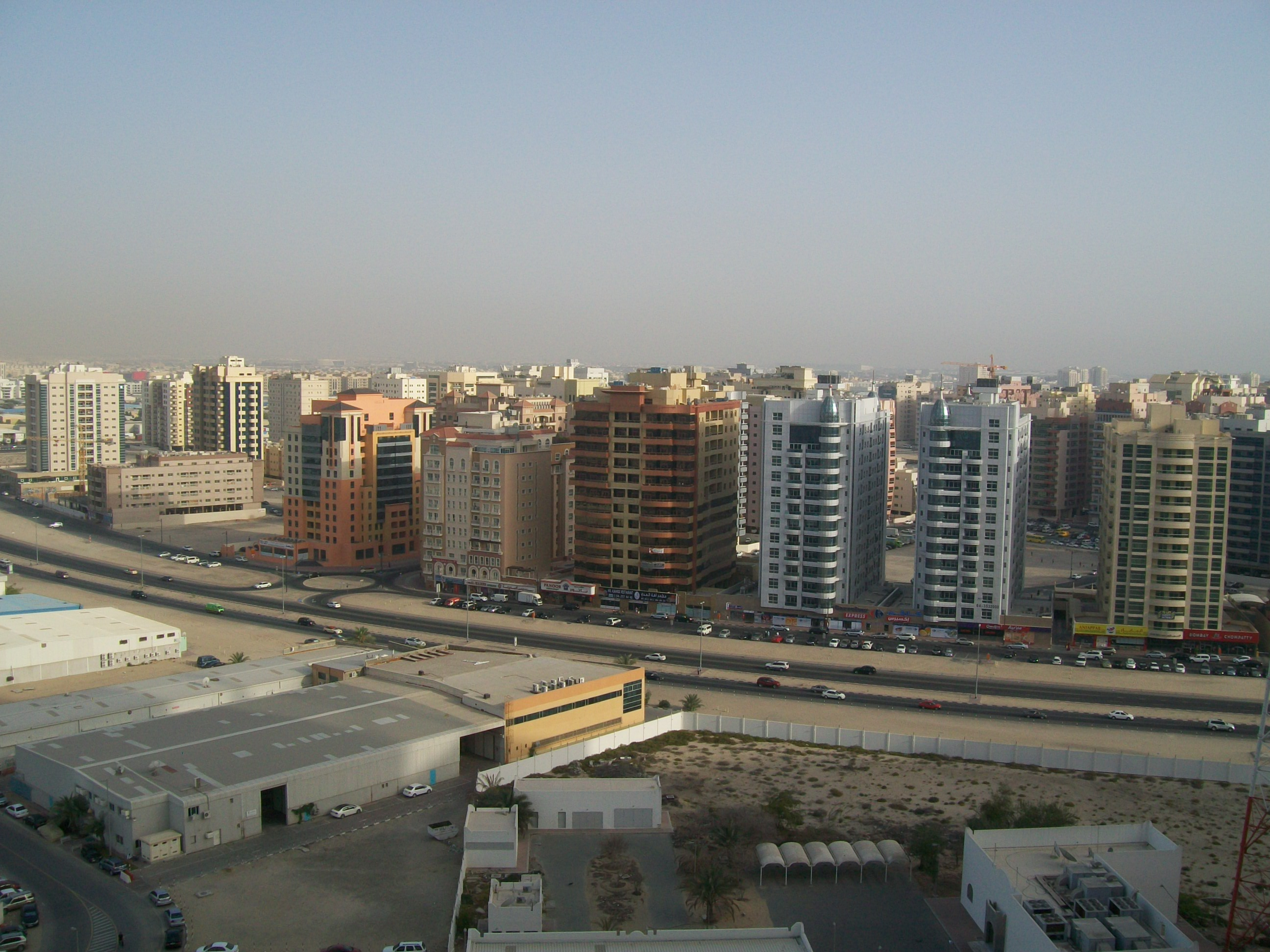 amman st al qusais dubai